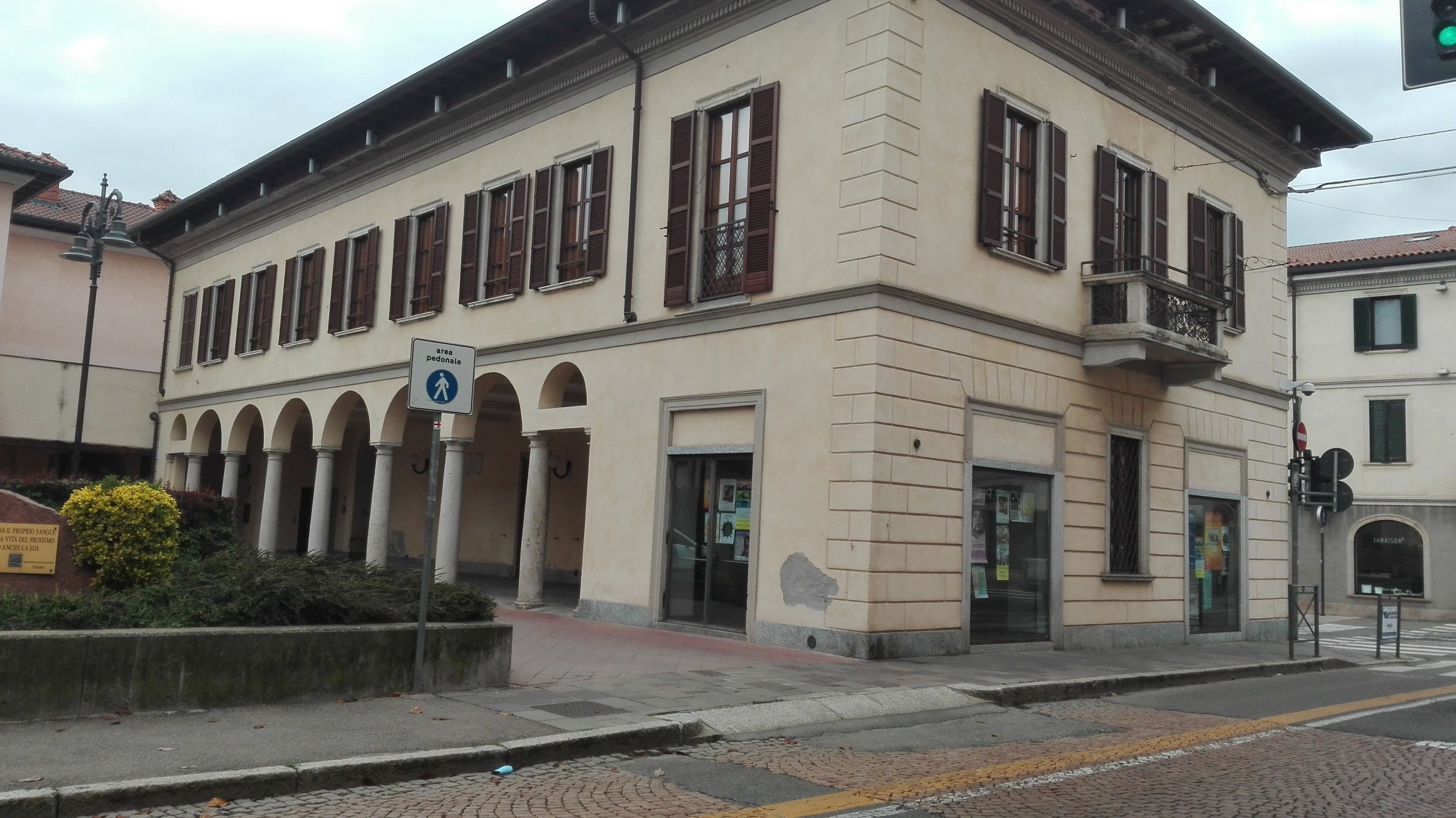 Villa Truffini, oggi sede del Municipio di Tradate